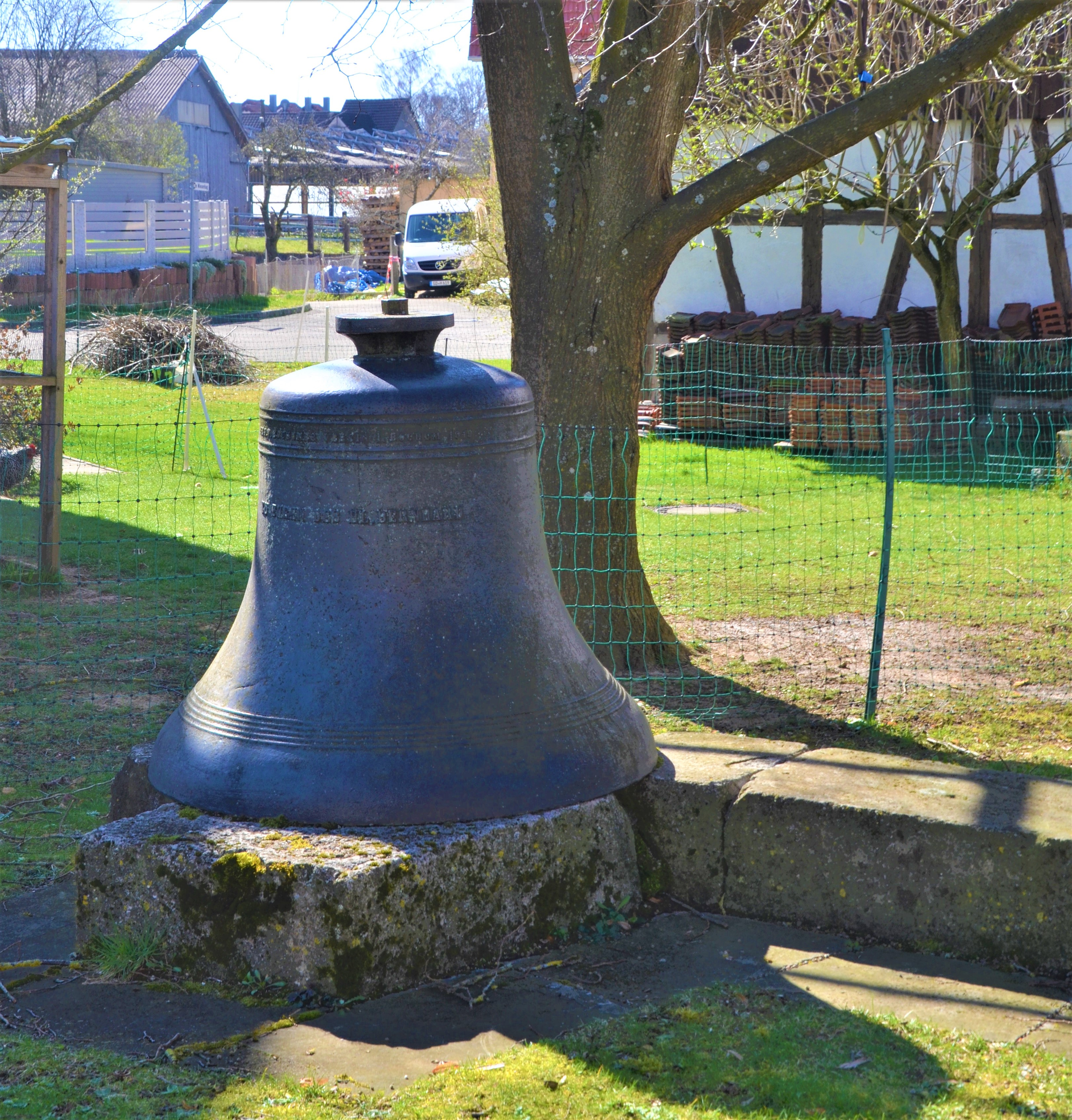 Denkmalglocke für die ehemalige Kirche St. Bernhard in Großdeinbach, gegossen 1919